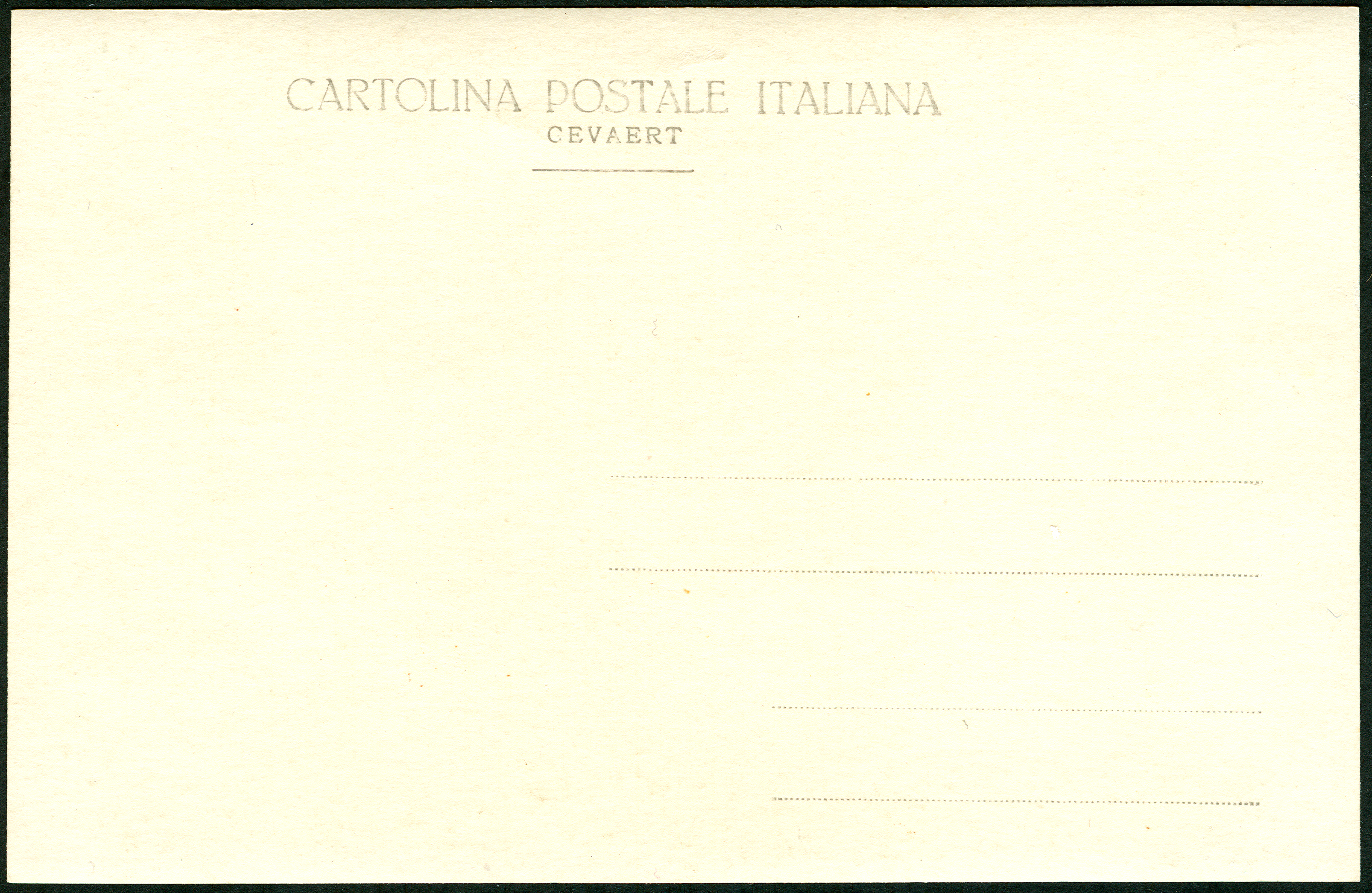 Rückseite (auch: Revers) der fortlaufend nummerierten Ansichtskarte Nummer 978 von Gevaert ...